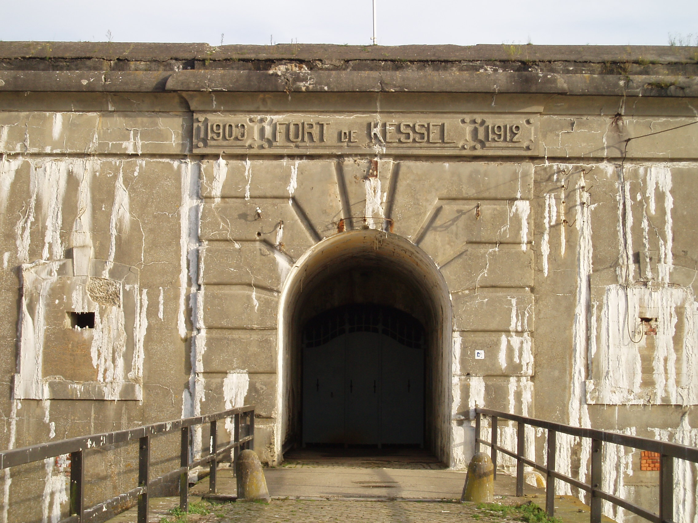 Fort van Kessel